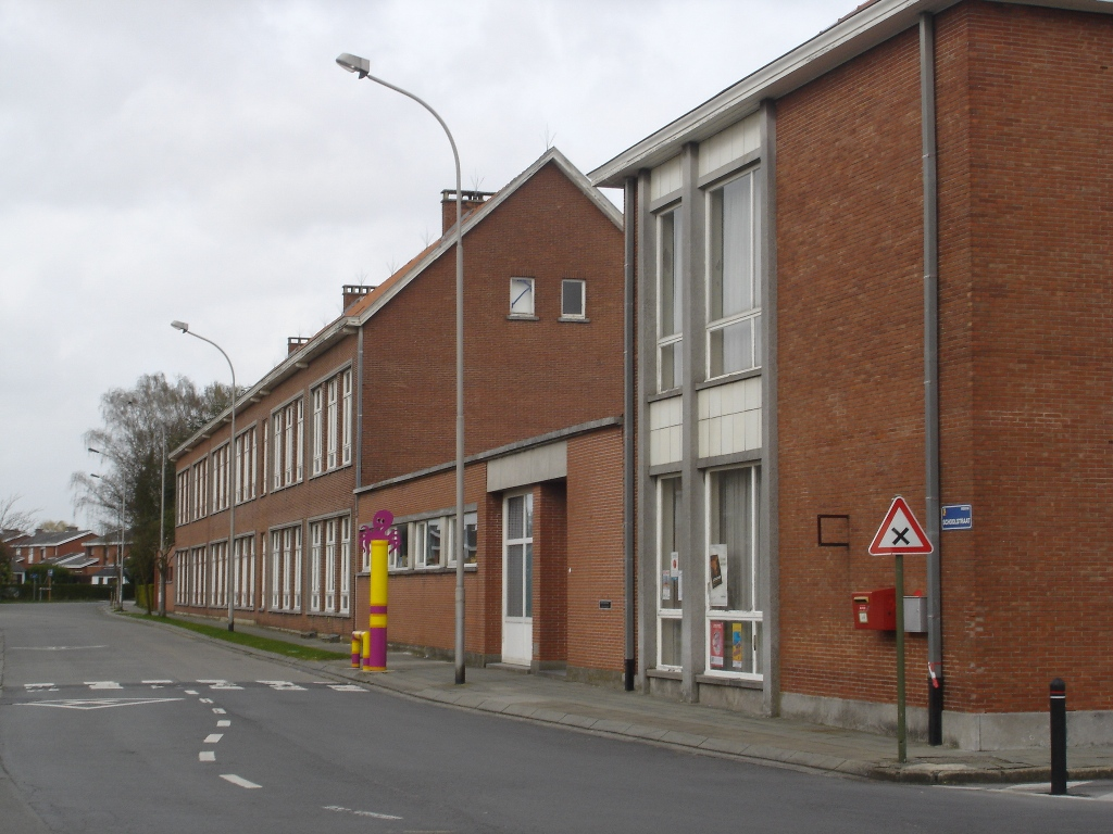 De oude meisjesschool.